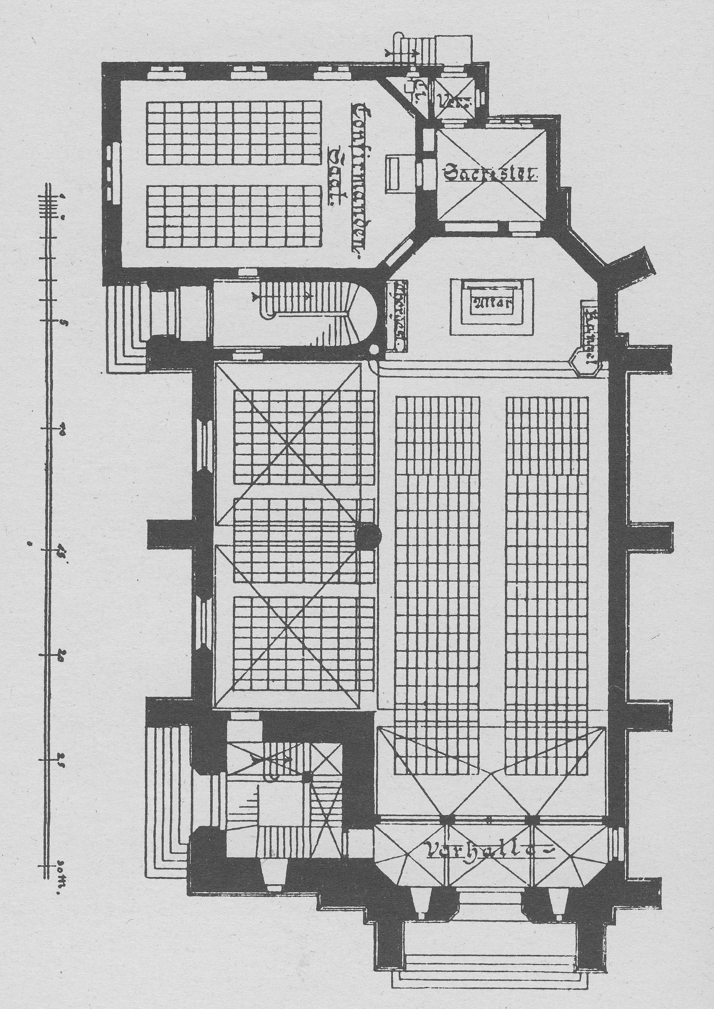 Grundriss des Erdgeschosses der Johanneskirche, Gießen, Deutschland Church plan Johanneskirche, Gießen, Germany